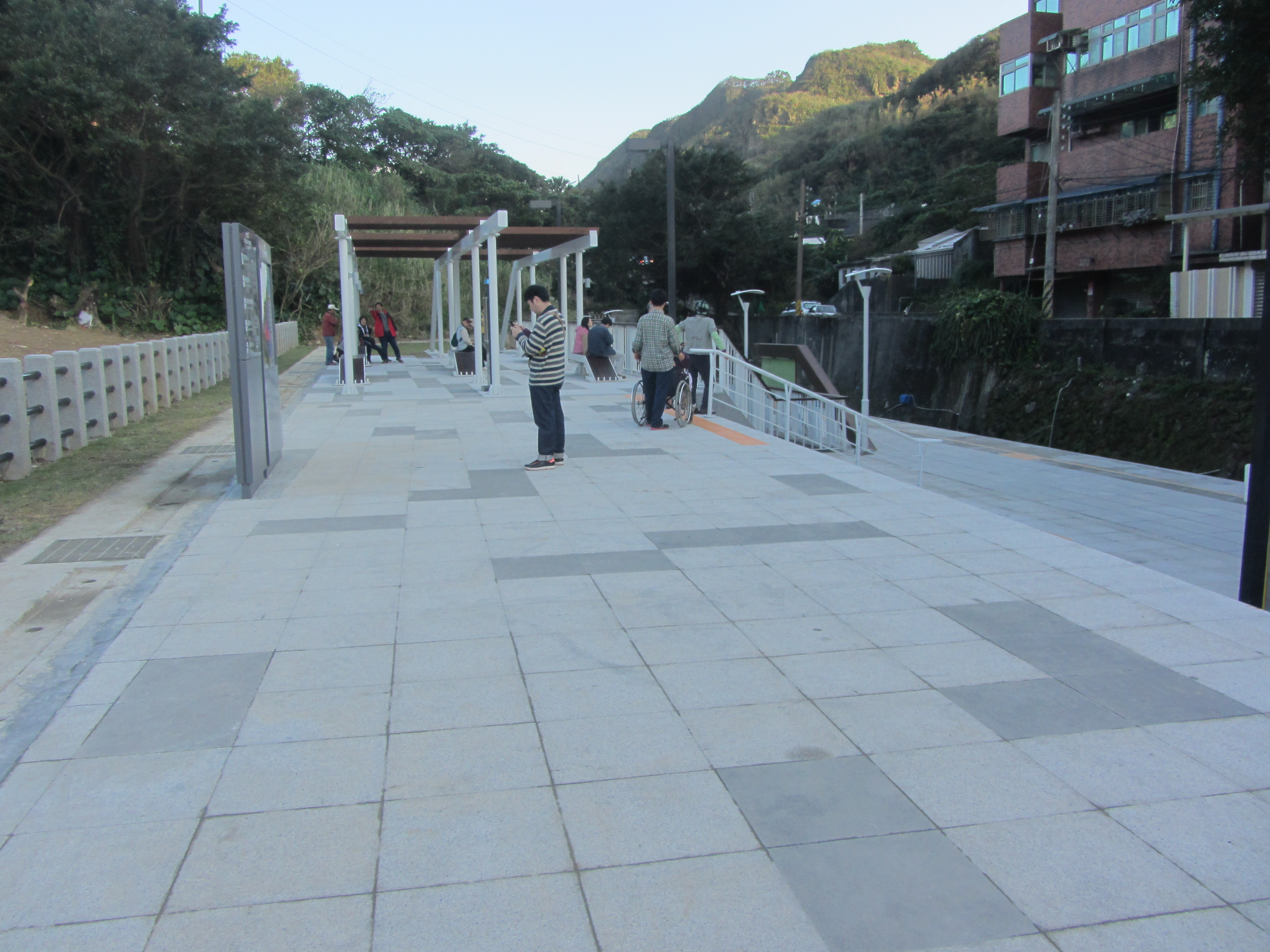 臺灣鐵路管理局深澳線海科館車站